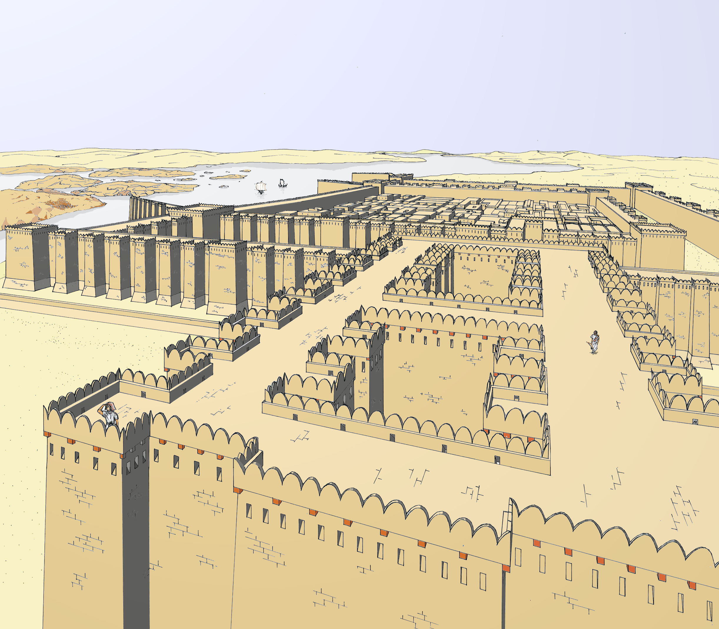 Reconstitution perspective de la forteresse haute de Mirgissa en Nubie, vue depuis le haut de la porte fortifiée nord (d'après les plans de jean vercoutter et une étude comparative avec les forteresses de la même période (Bouhen))